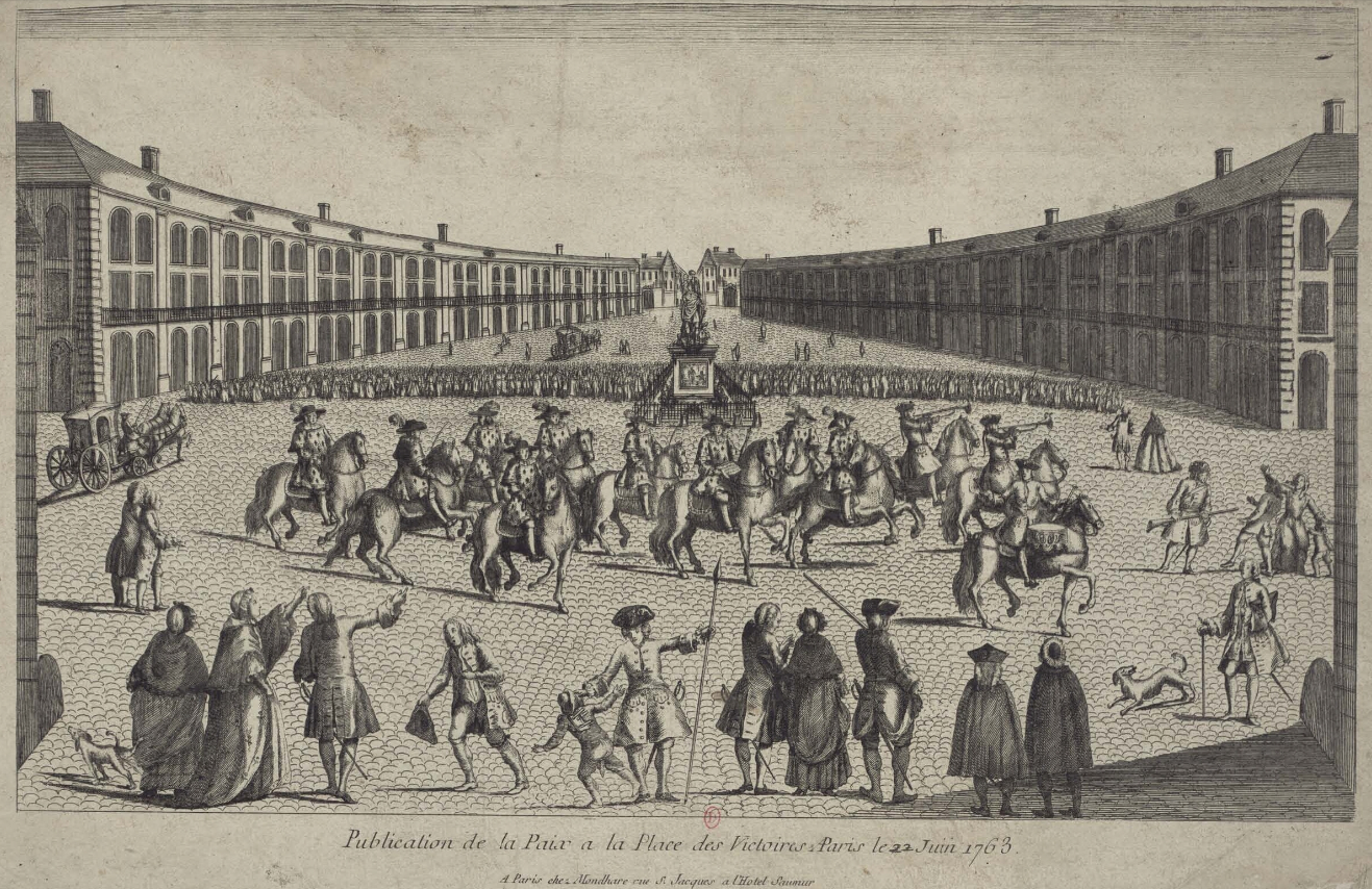 Publication de la Paix à la Place des Victoires à Paris le 22 Juin 1763. Editeur: Chez Mondhare rue S. Jacques a l'Hotel Saumur Estampe, Eau-forte Format: 269 x 420 mm Bibliothèque de l'Institut National d'Histoire de l'Art, collections Jacques Doucet NUM OC 148 (3).